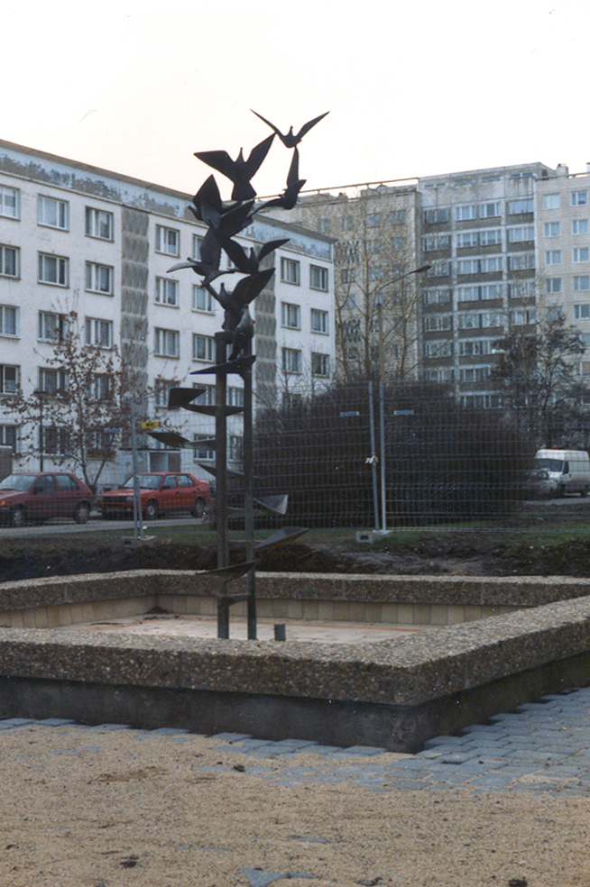 Rudolf Hilscher, Taubenbrunnen, 1967/70, Bronze Am Taubenbrunnen